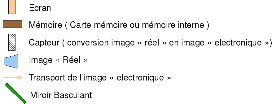 Legende pour les schema APN_*.jpg